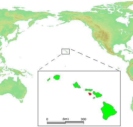 Hawaii Islands - Lanai.PNG